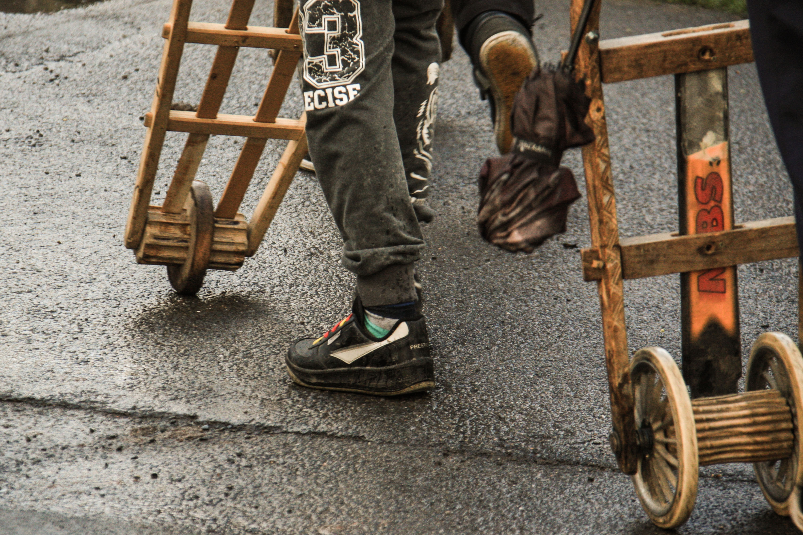 Terkotki taczkowe. Klepotarze (klapotáři) obchodzą domy ze swoimi klapotkami (rapači).